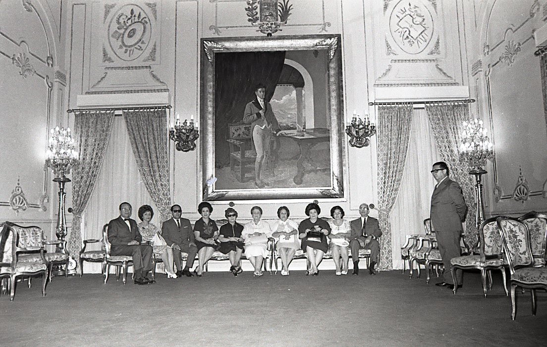 Visita de familiares del expresidente Joaquín Crespo al Palacio de Miraflores.